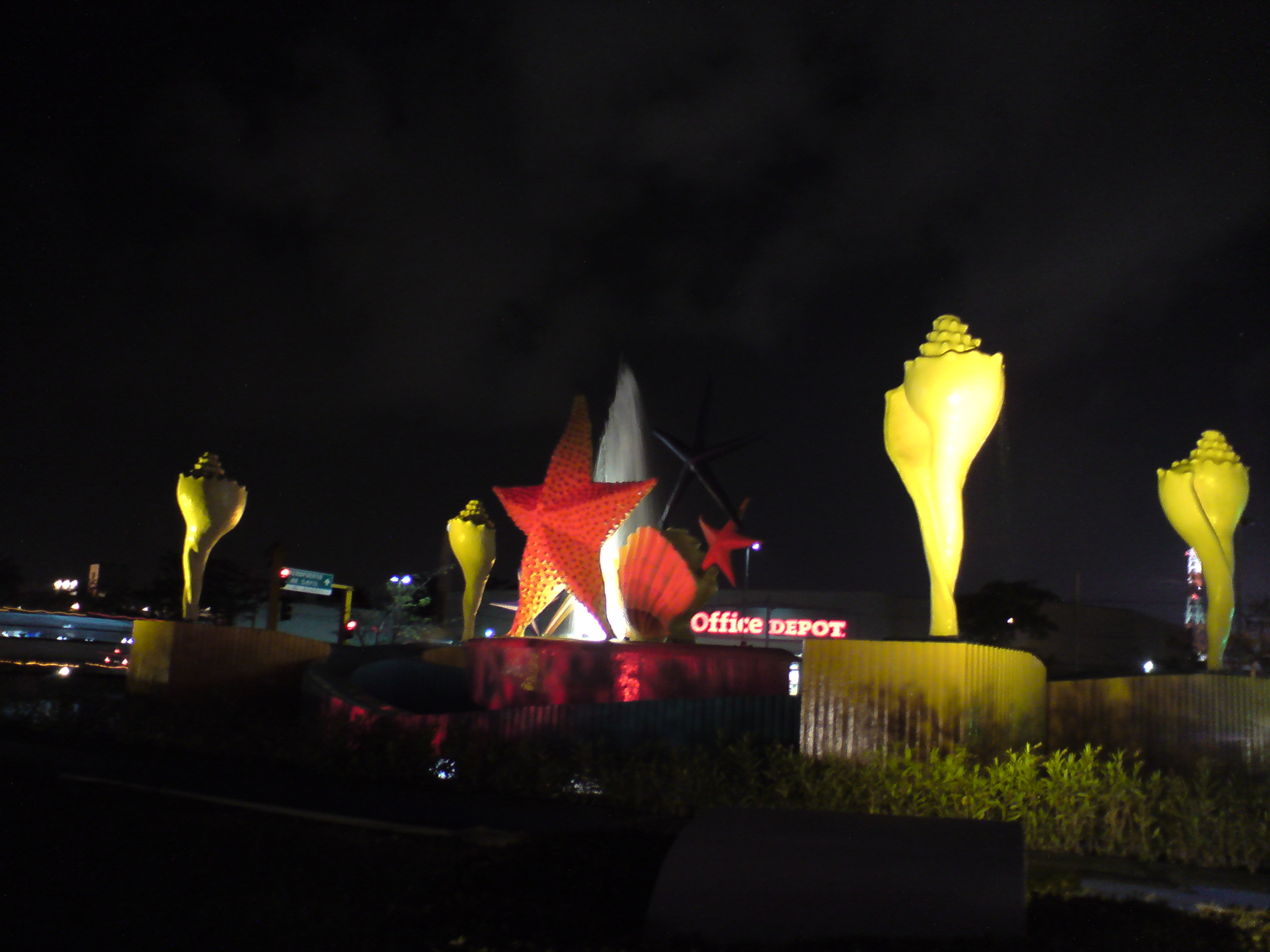 Fuente Diálogo Norte Sur "Ceviche"